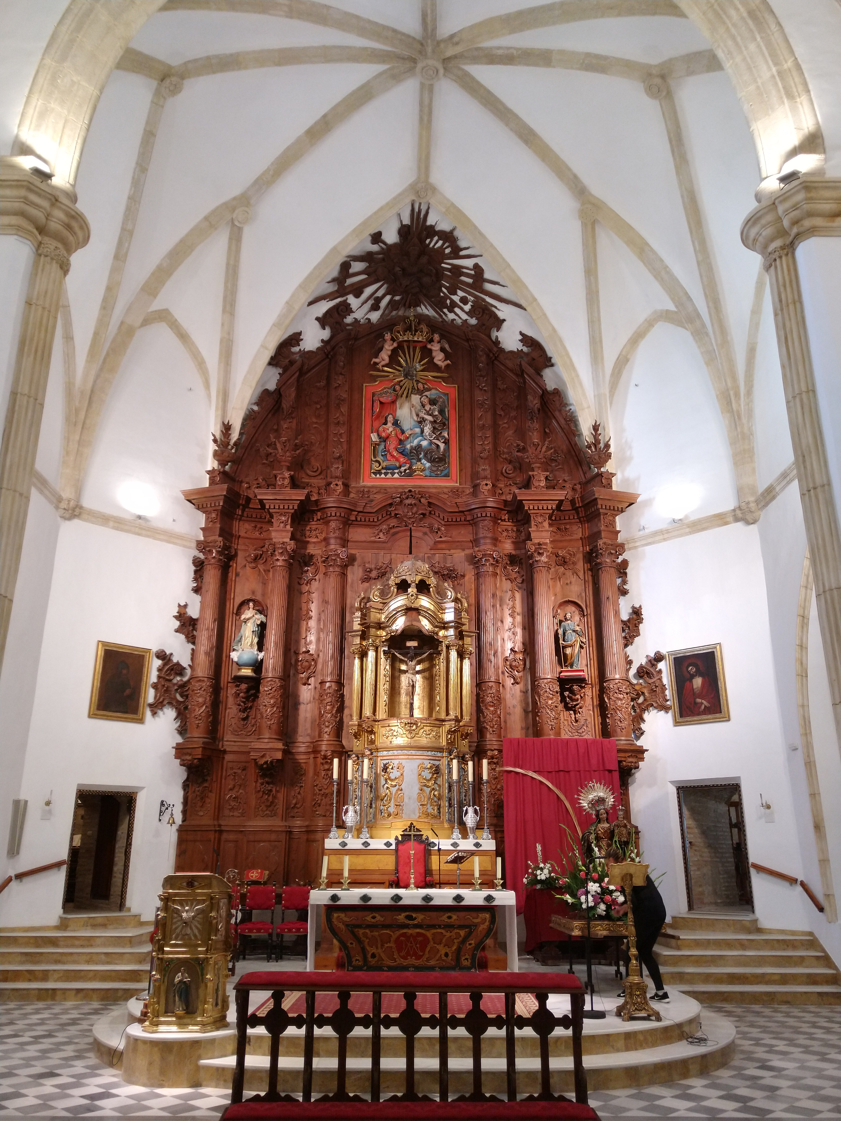 Bien de Interés Cultural en Vera, España